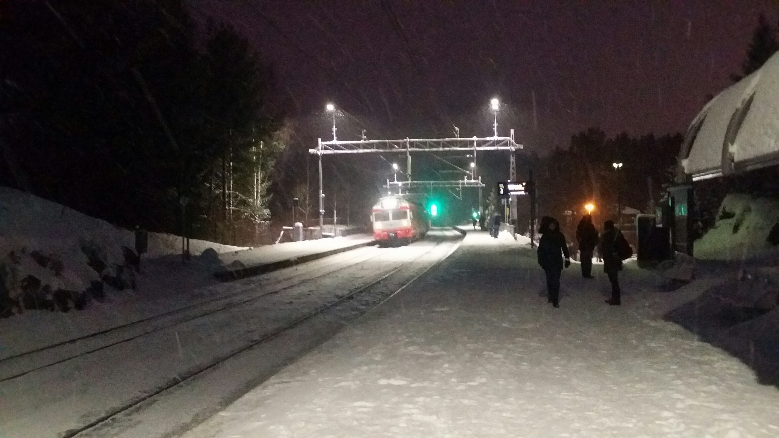 Vintermorgen på Vevelstad holdeplass.